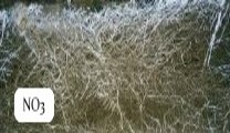 Wurzelbild nach einer herkömmlichen Stickstoffdüngung mit Nitrat